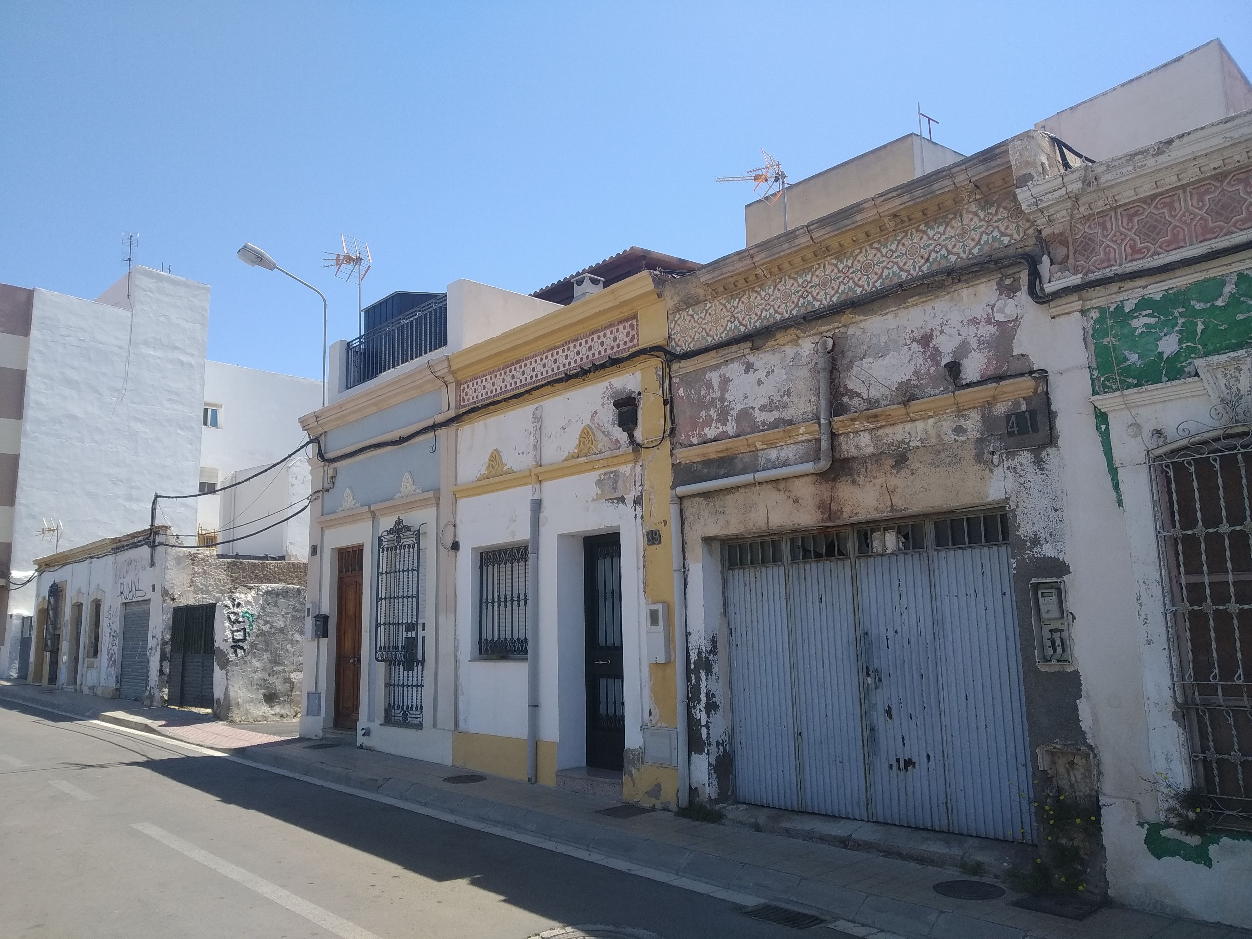 Restos de arquitectura de puerta y ventana en la calle Pilares.